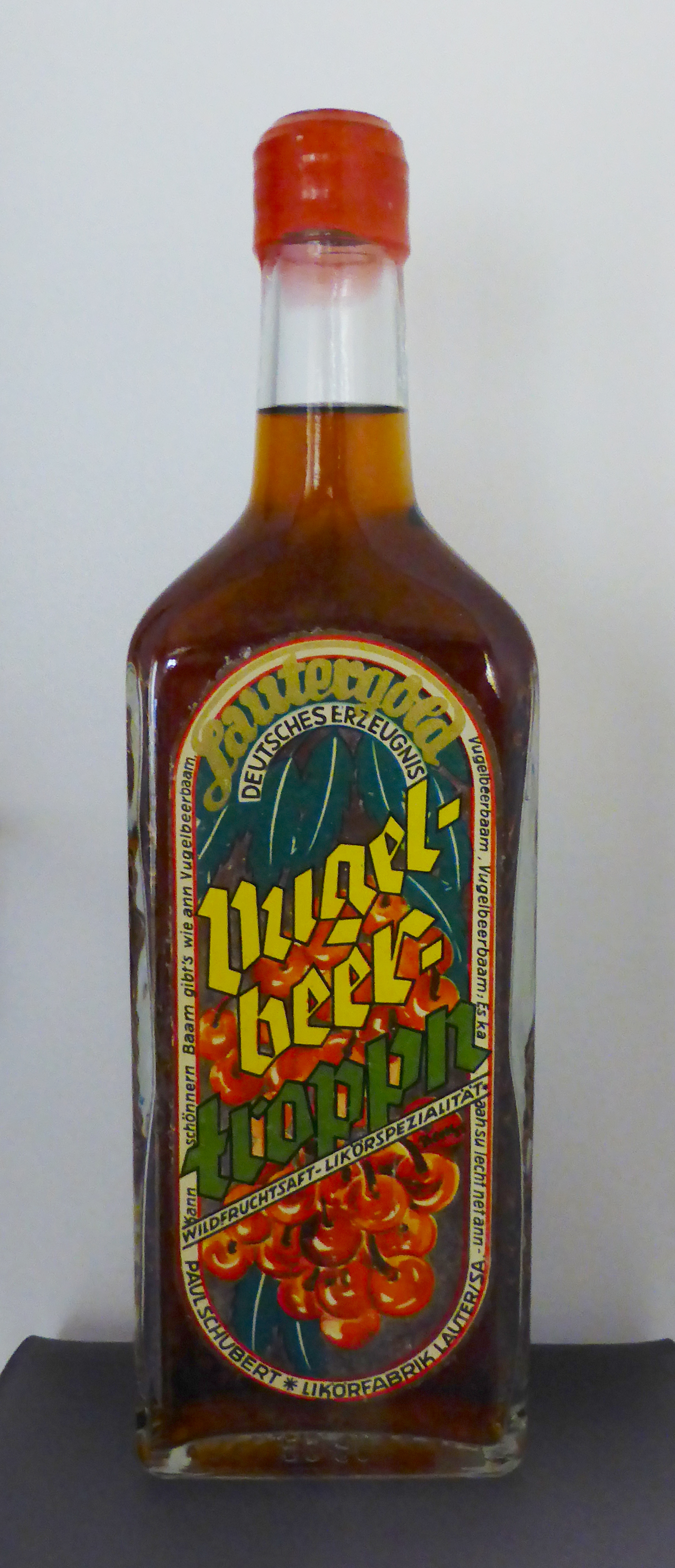 Flasche Lautergold Vugelbeertroppn um 1930. Ausgestellt im Museum sächsisch-böhmisches Erzgebirge in Marienberg.